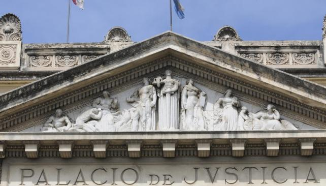 Parte Superior Frontal